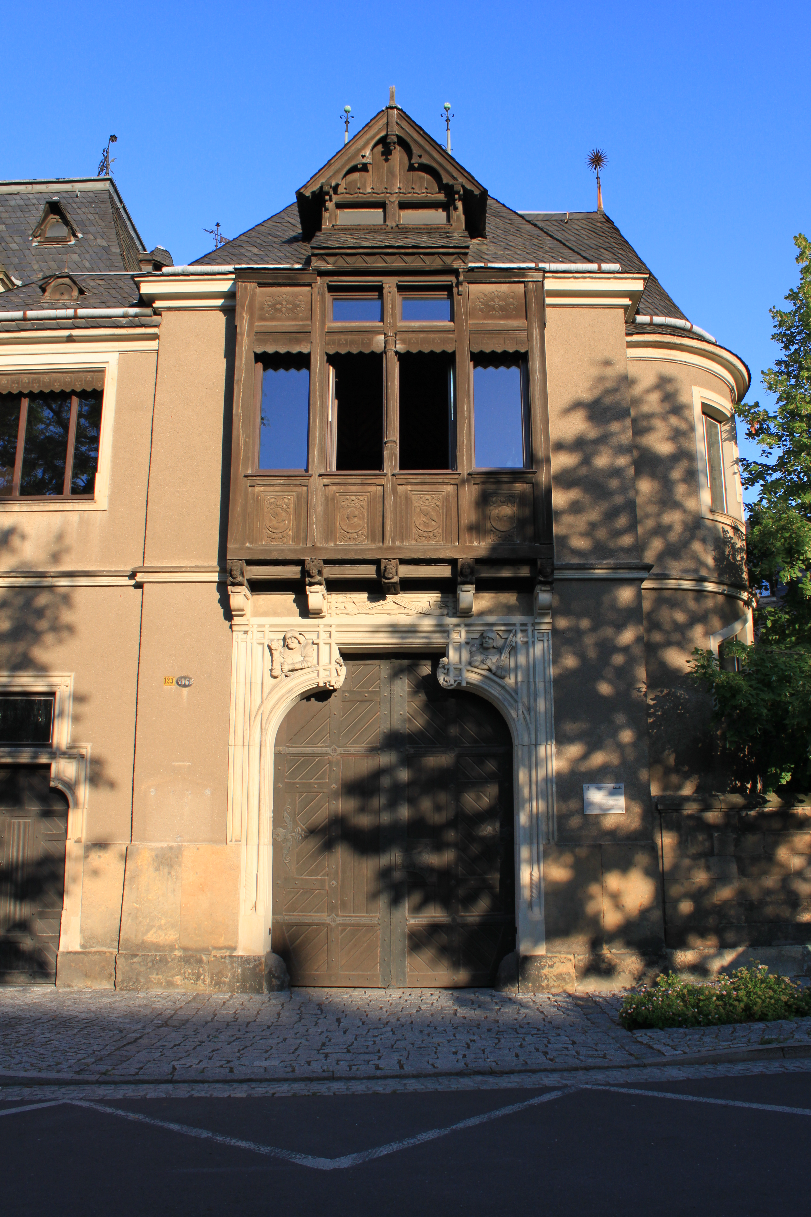 Portal der Zschille-Villa in Großenhain